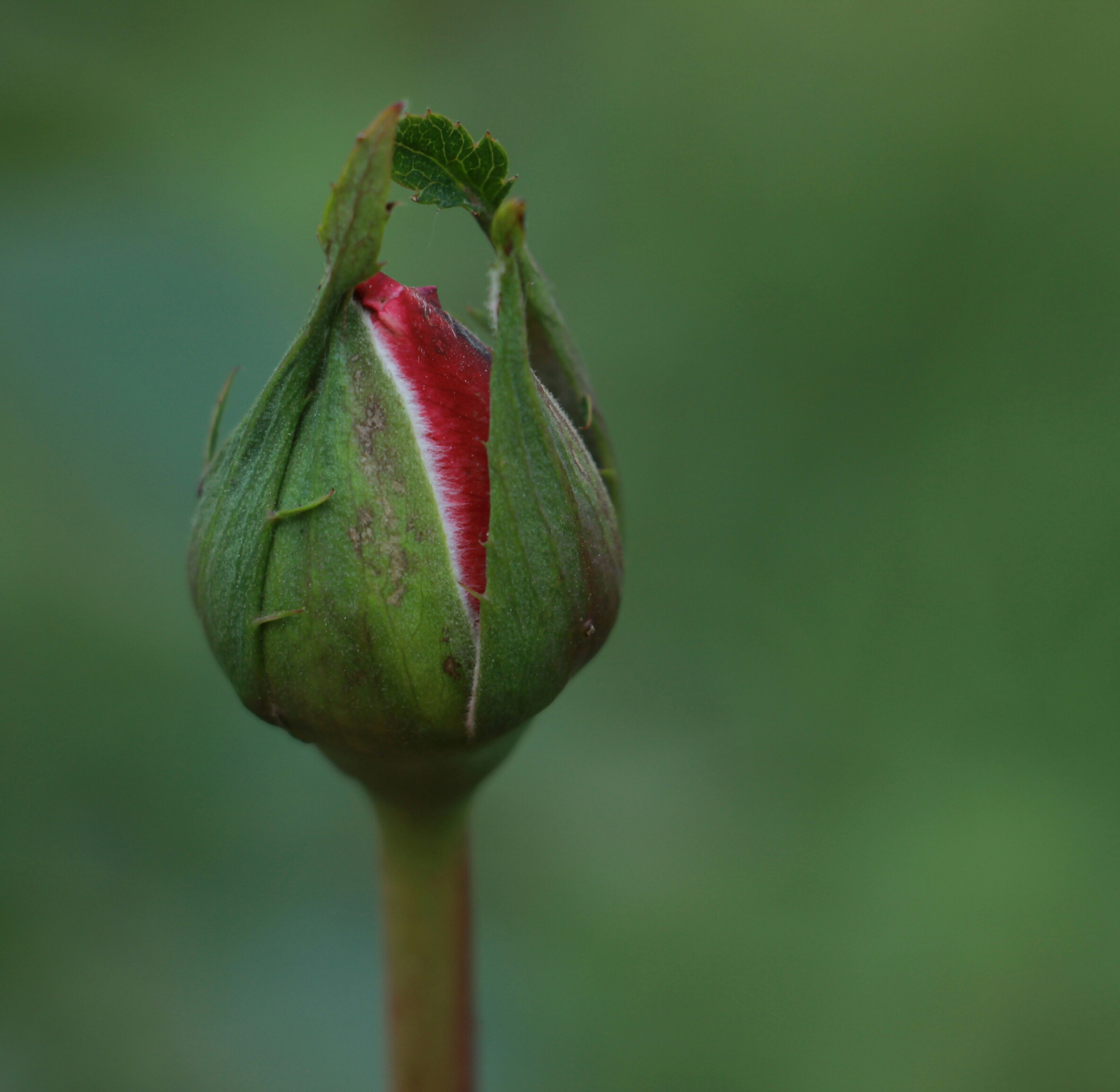 פרח בעומק שדה